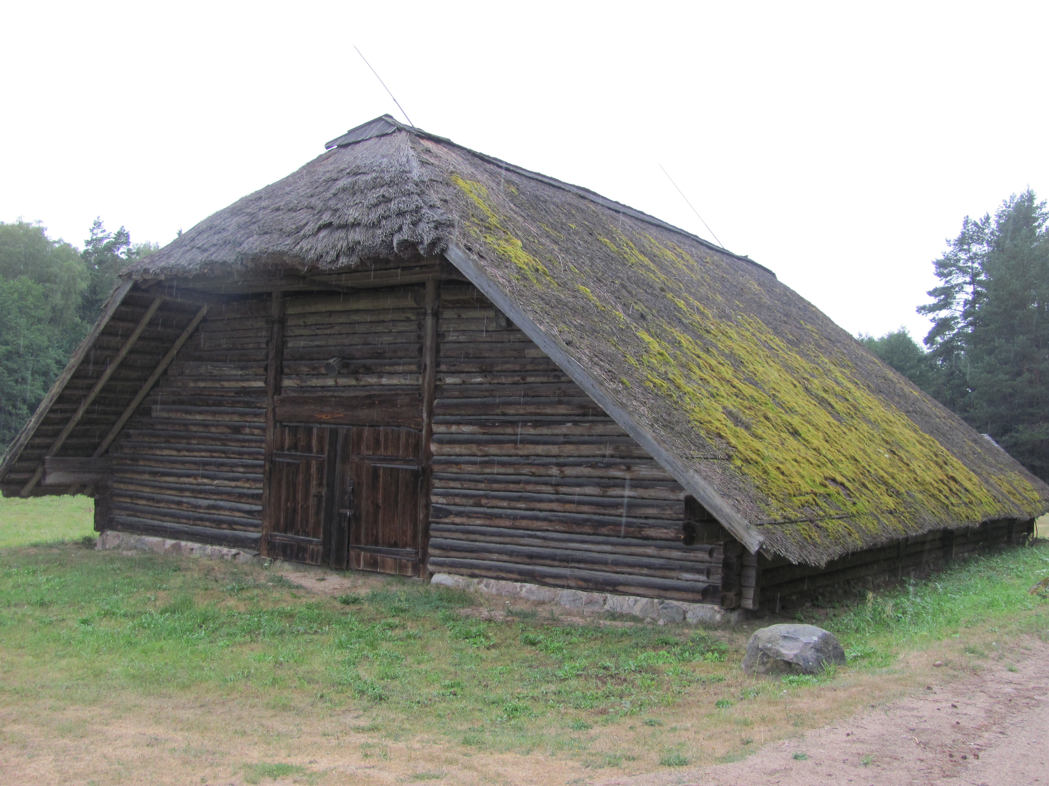 Tauragnų sen., Lithuania